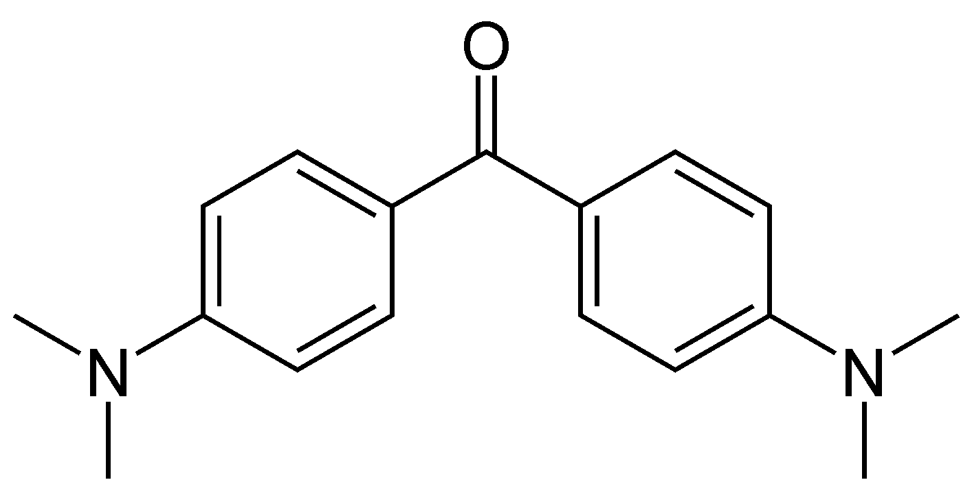 Michler's ketone, Michlers Keton